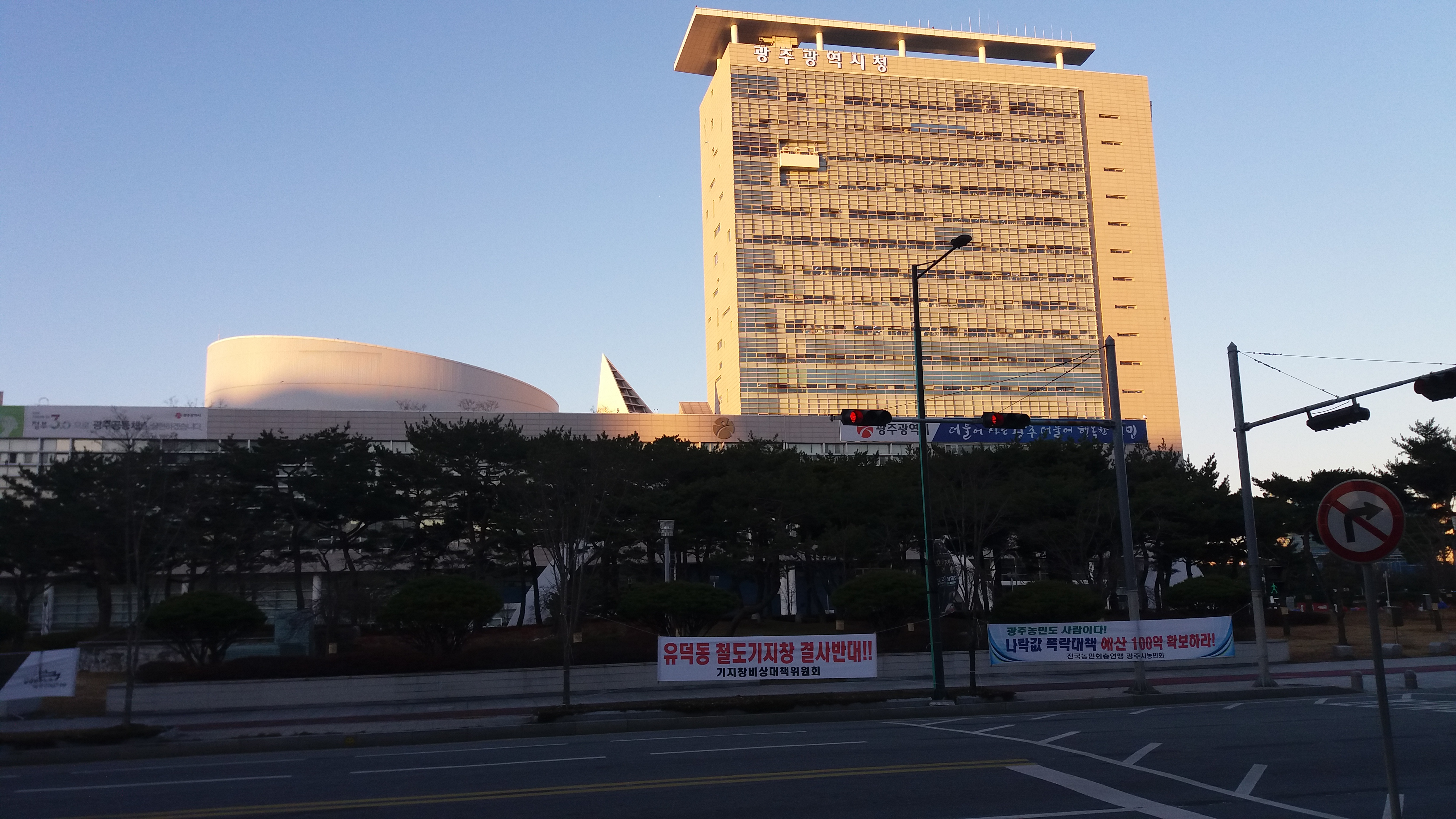 광주광역시청